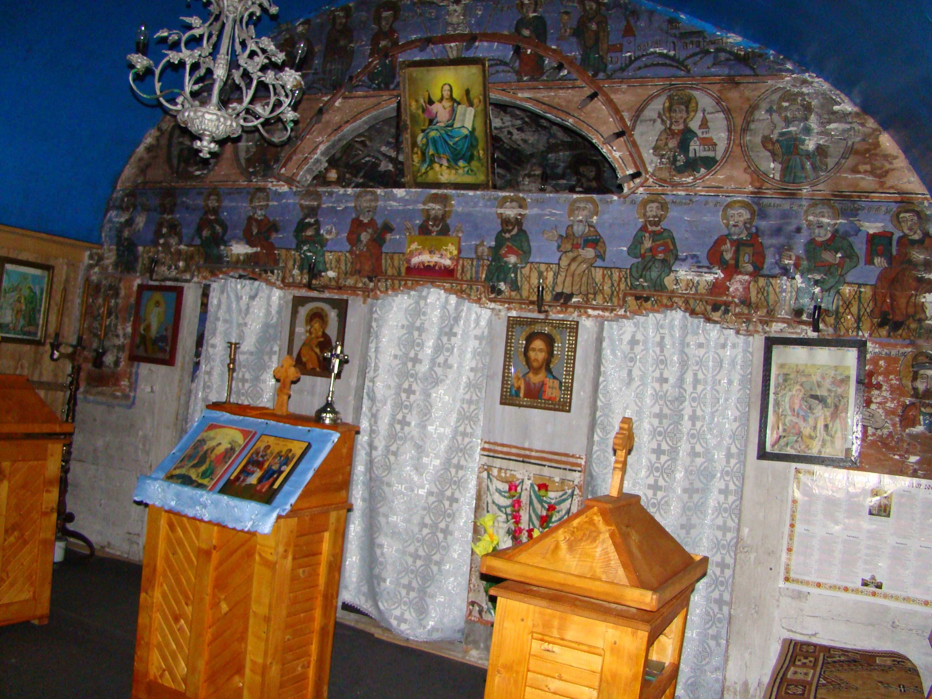 Biserica de lemn din Belioara(Poșaga de Sus)